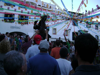 fiestas de ferreries